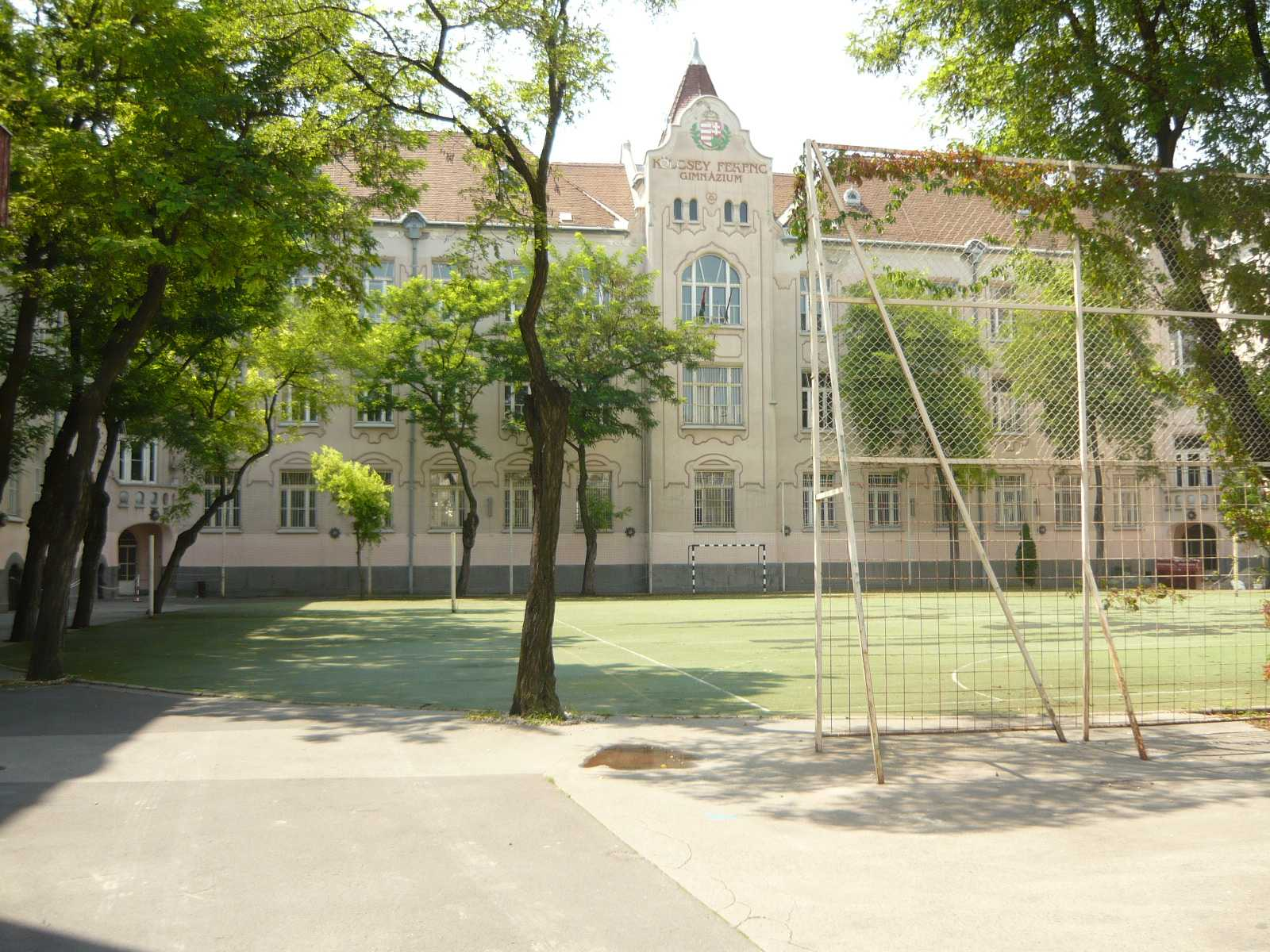 A budapesti Kölcsey Ferenc Gimnázium udvara és épülete. - Budapest, VI. Munkácsy Mihály u. 26 (helyi védelem: -7928) This is a photo of a monument in Hungary, Identifier: -7928